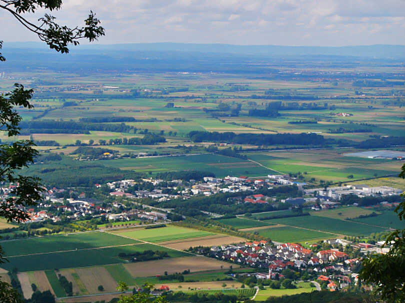 Das Foto zeigt den Rheingraben vom Melibokus, der höchsten Erhebung des westlichen Odenwaldes aus. Aufnahme: Das Foto entstand im August 2004 und wurde von Diana Kremer aufgenommen.